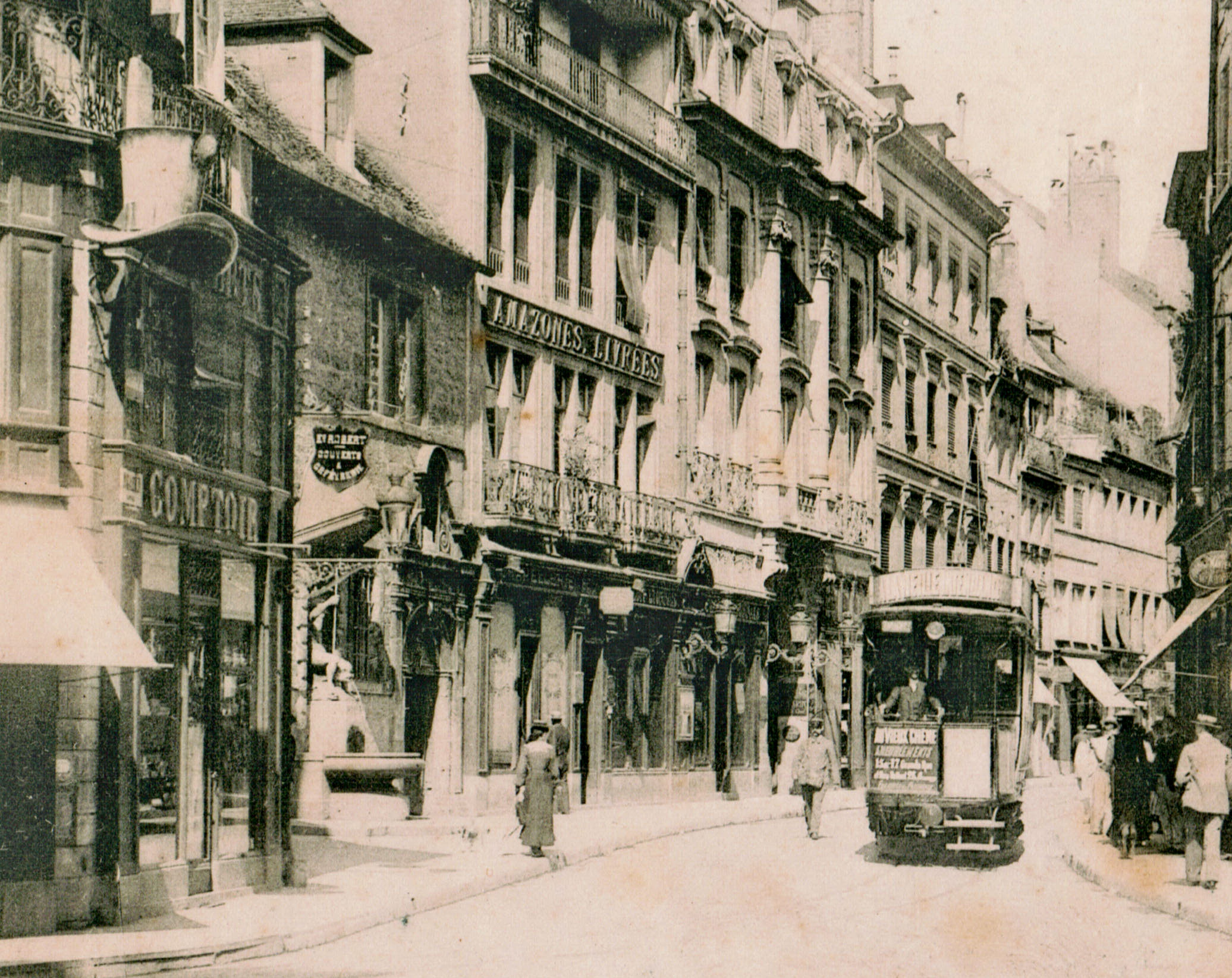 Détail d'une carte postale ancienne, sans nom d'éditeur, n°100Besançon : La grande-Rue